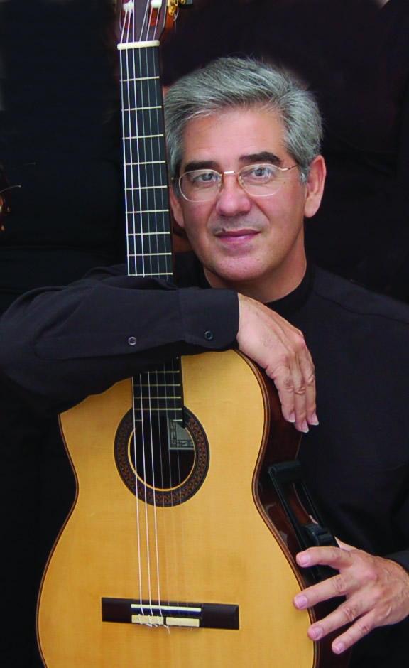 Edson Lopes